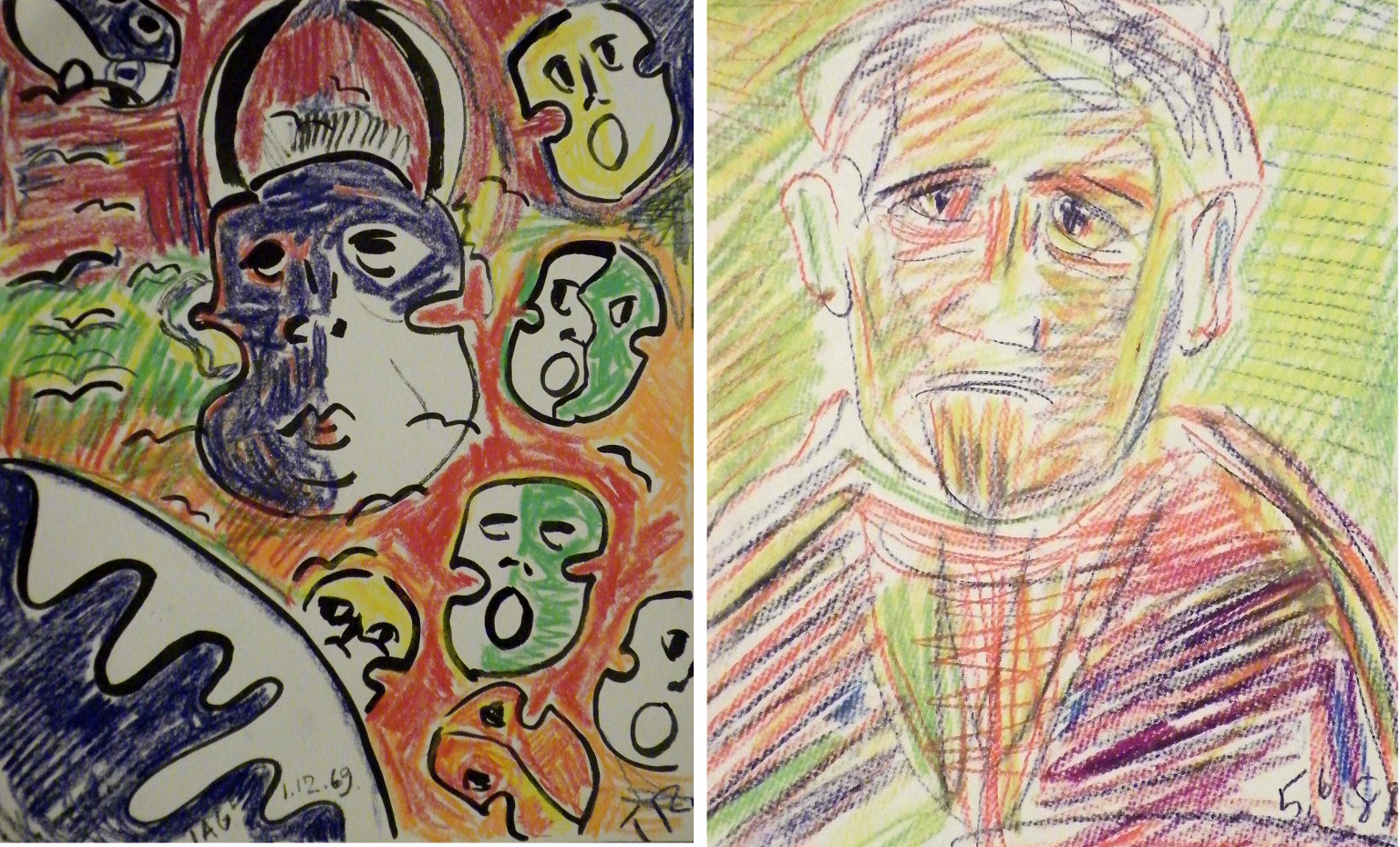 Färg Teckningar